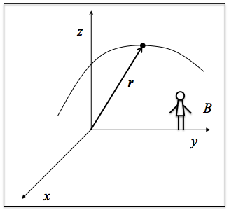 Higidura behatzeko erreferentzia-sistemaren eskema